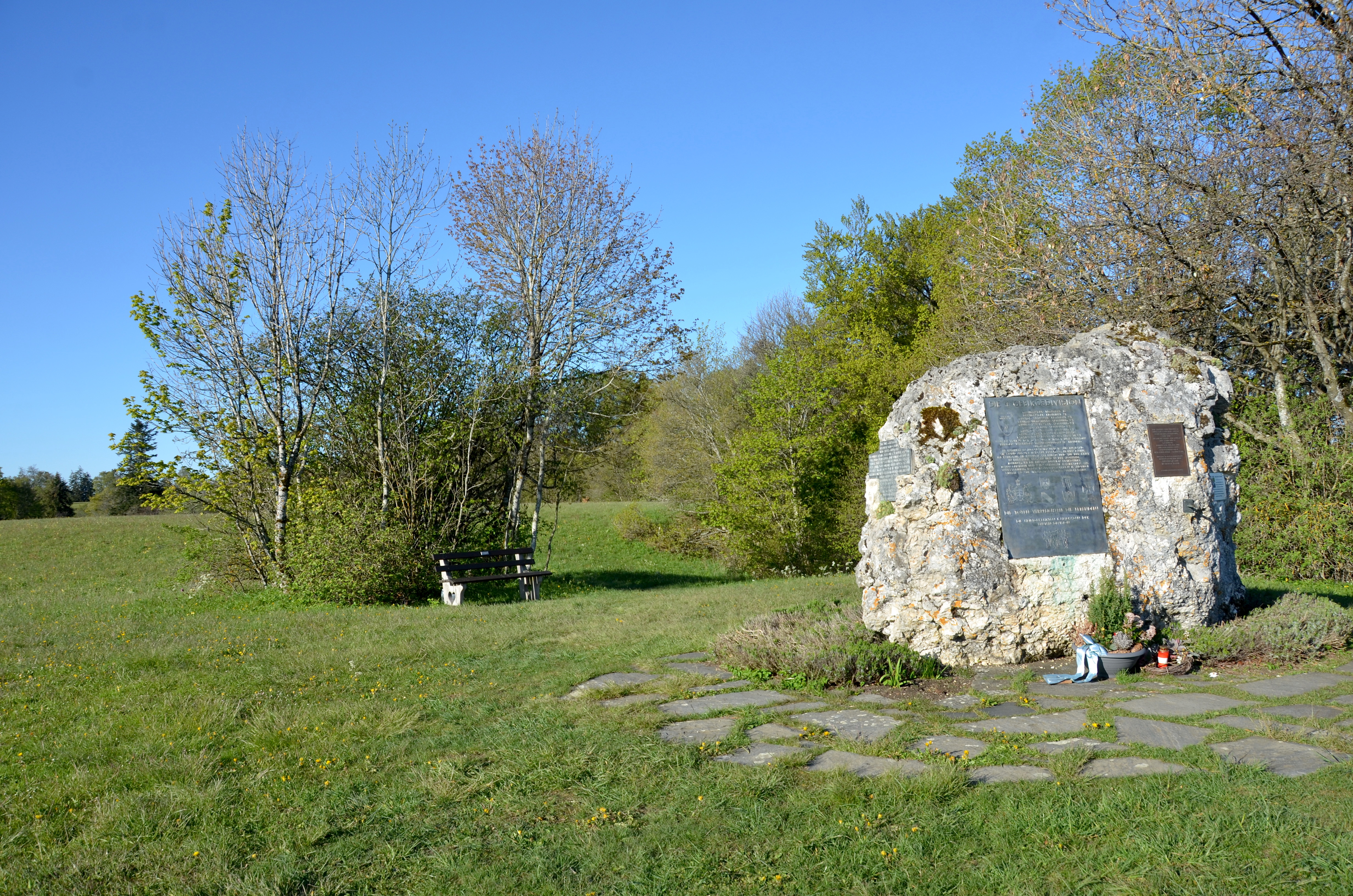 (NSG:BW-4.117)_Hülenbuchwiesen, Südwestalb und Oberes Donautal (EU-Vogelschutzgebiet), FFH-Gebiet Östlicher Großer Heuberg, Wasserschutzgebiet Mohrenwirtswald. Gedenkstein für die Gefallenen der 4. Gebirgsdivision im 2. Weltkrieg.